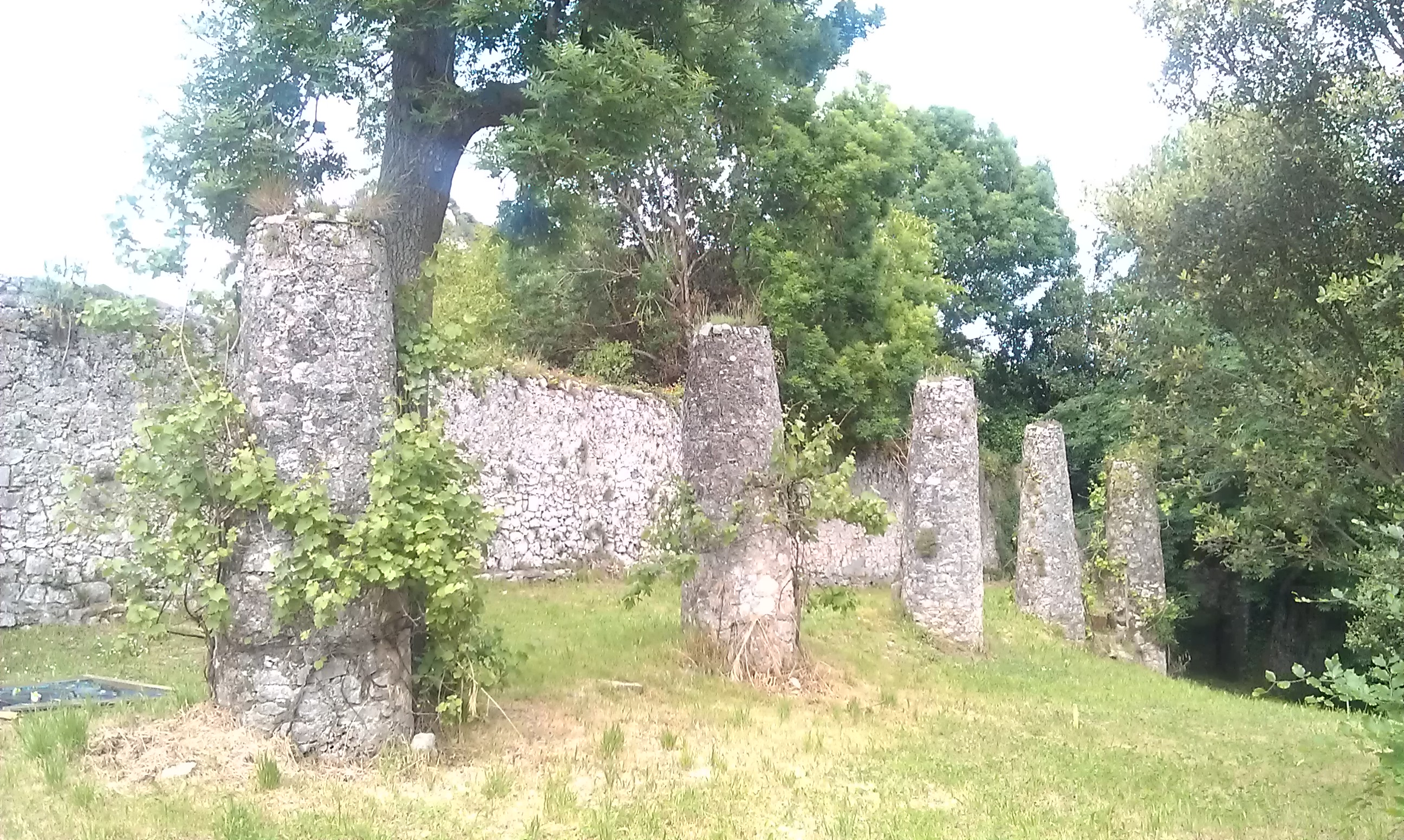 Pilonos exteriores a la muralla de la Torre de Velo en Arce, Cantabria.